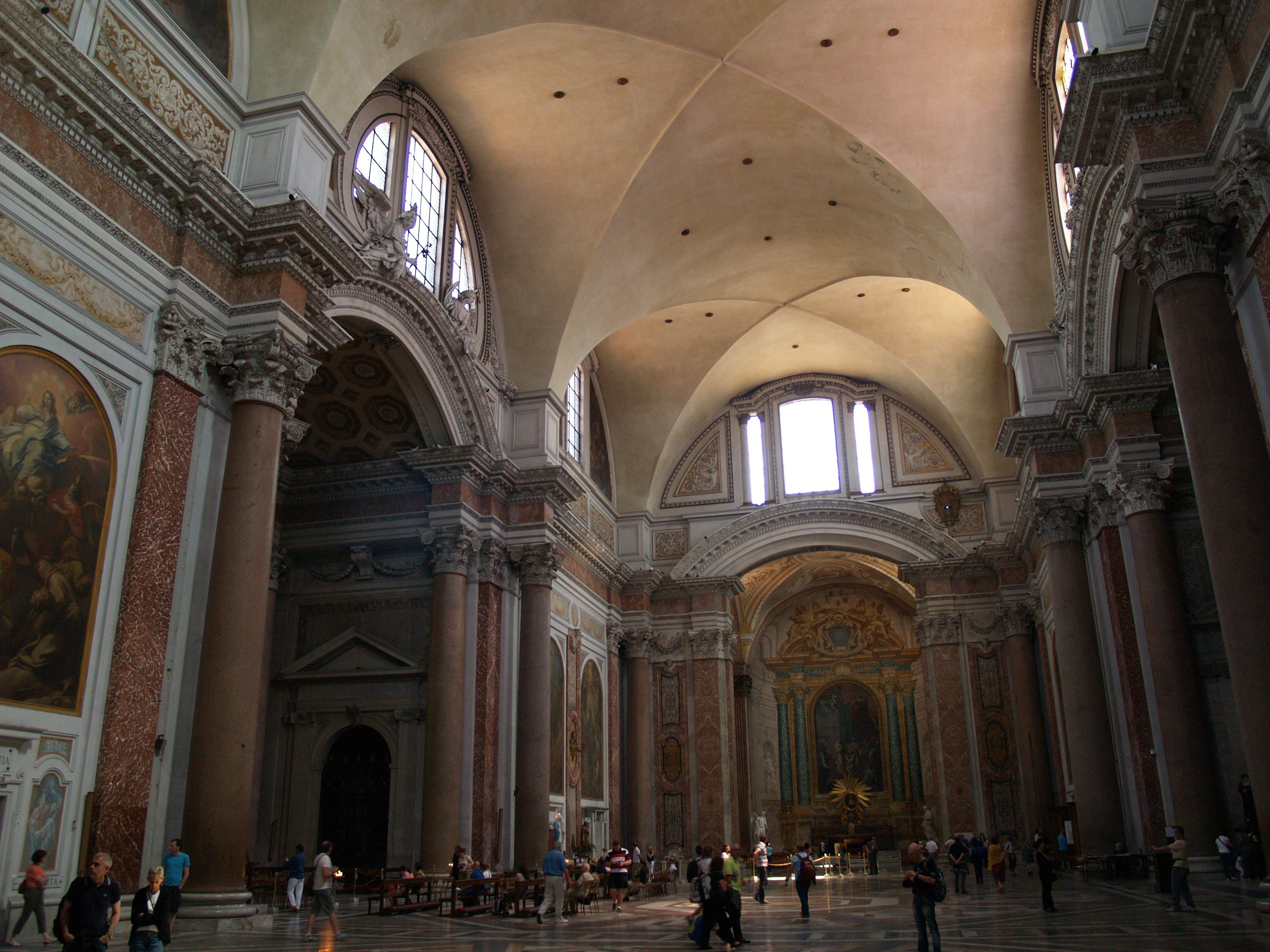 Roma. Santa Maria degli Angeli. Interior.